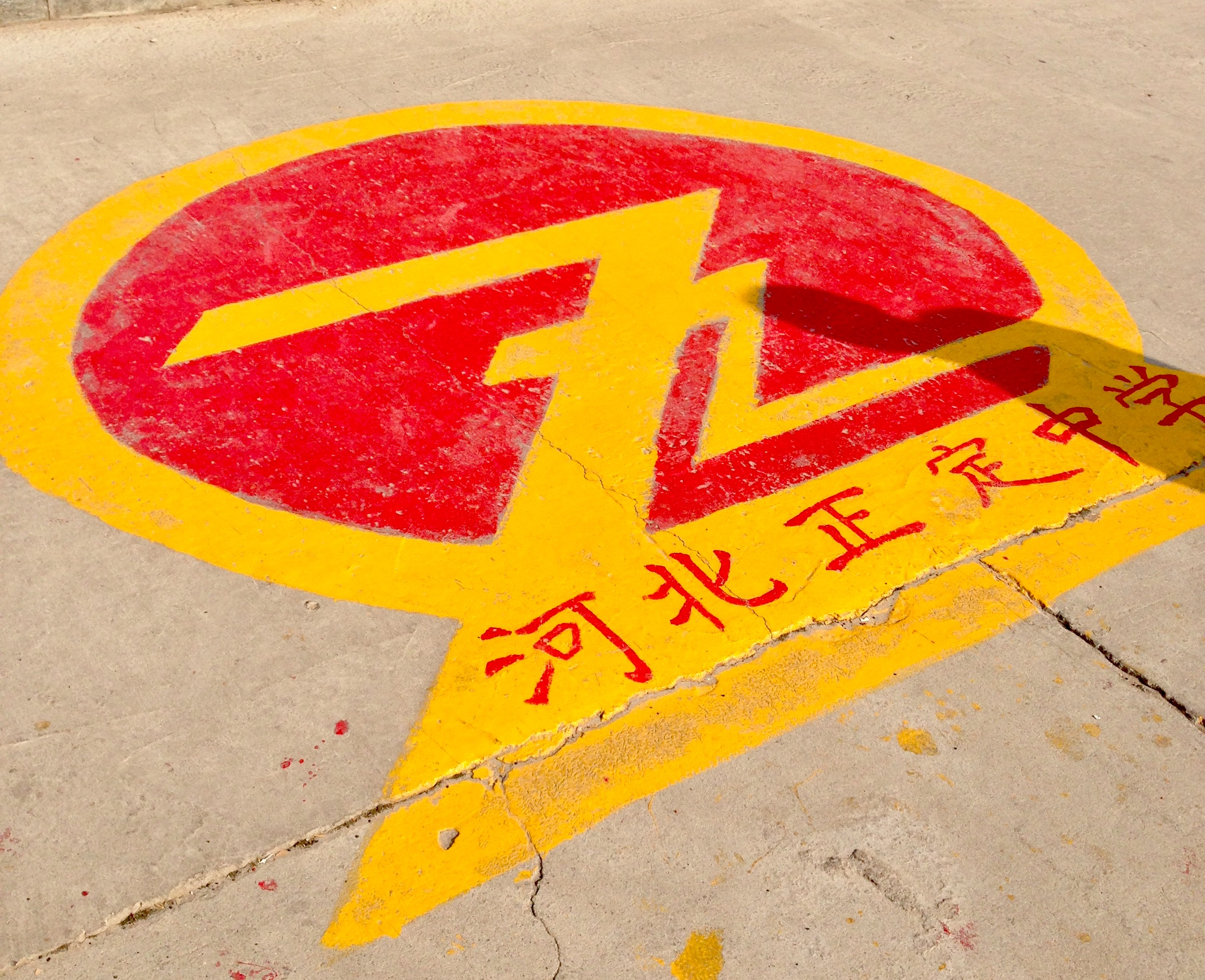 河北正定中学的校园里画的校徽